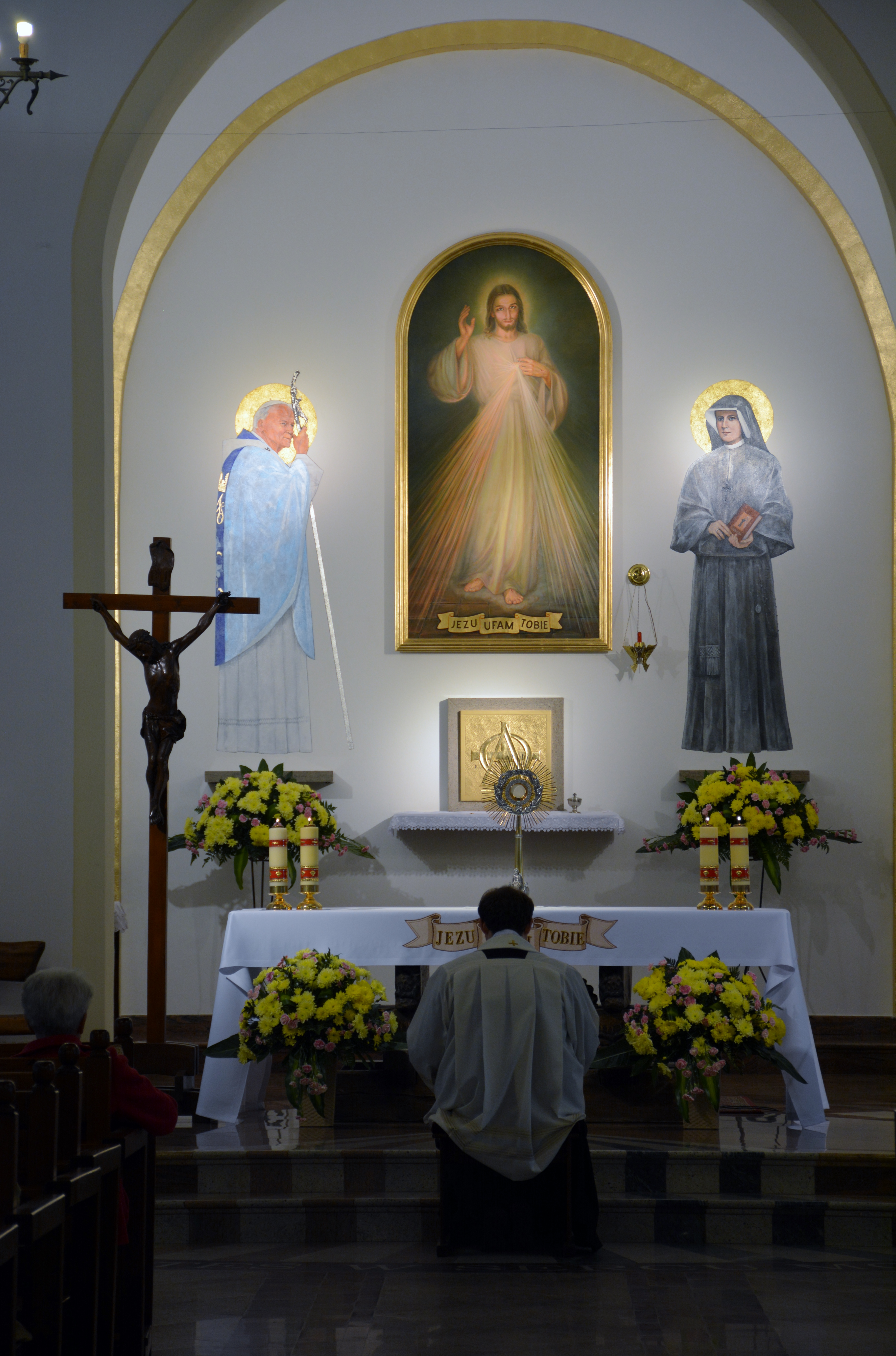 Młynów, Warszawa, Poland